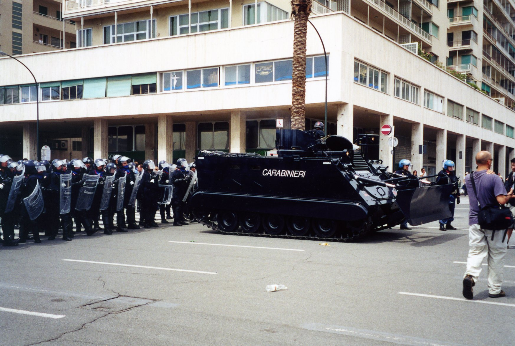 Mobilisation Altermondialiste juillet 2001 Sommet contre le G8